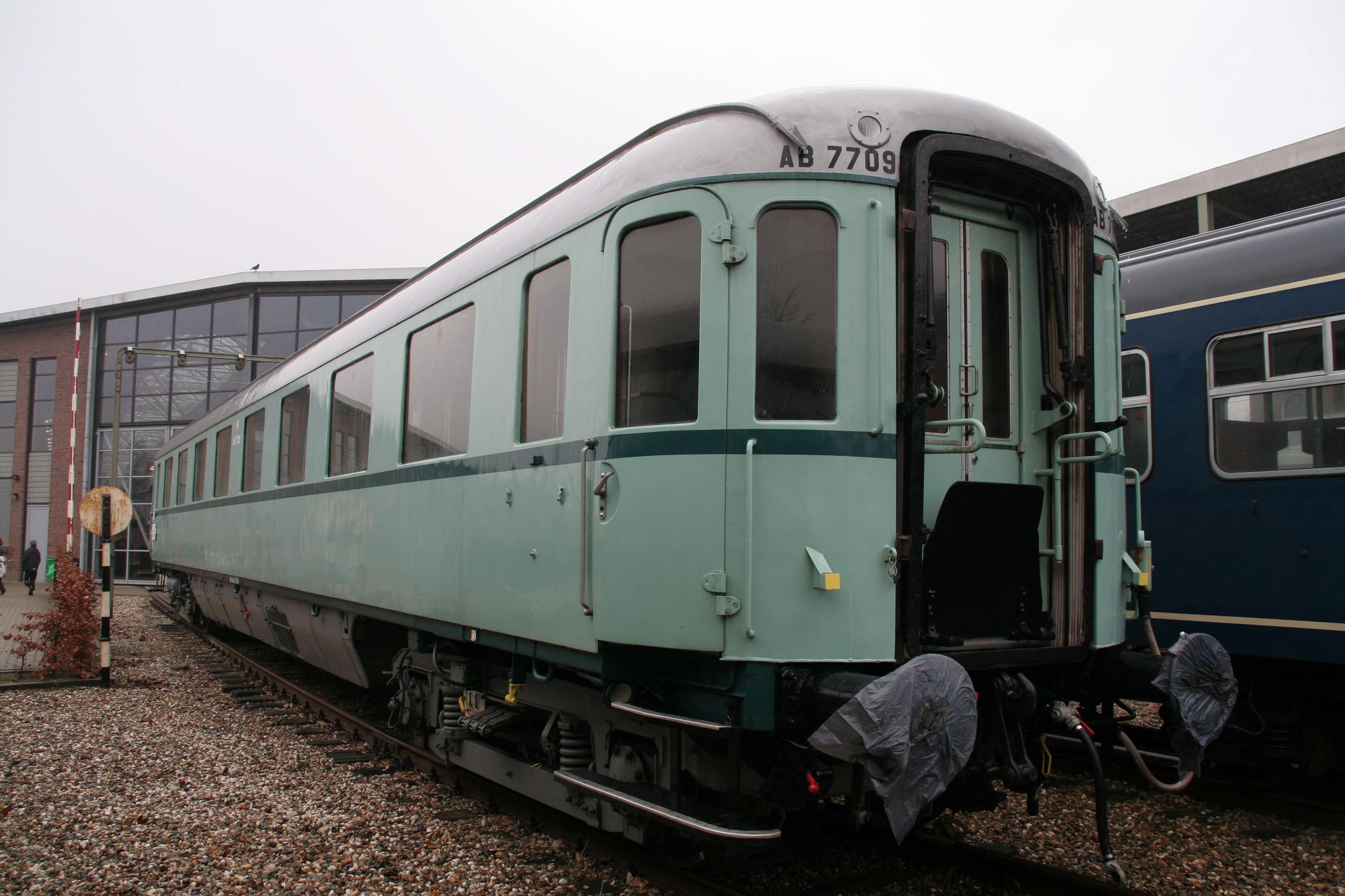 Plan D AB 7709 in het Spoorwegmuseum.